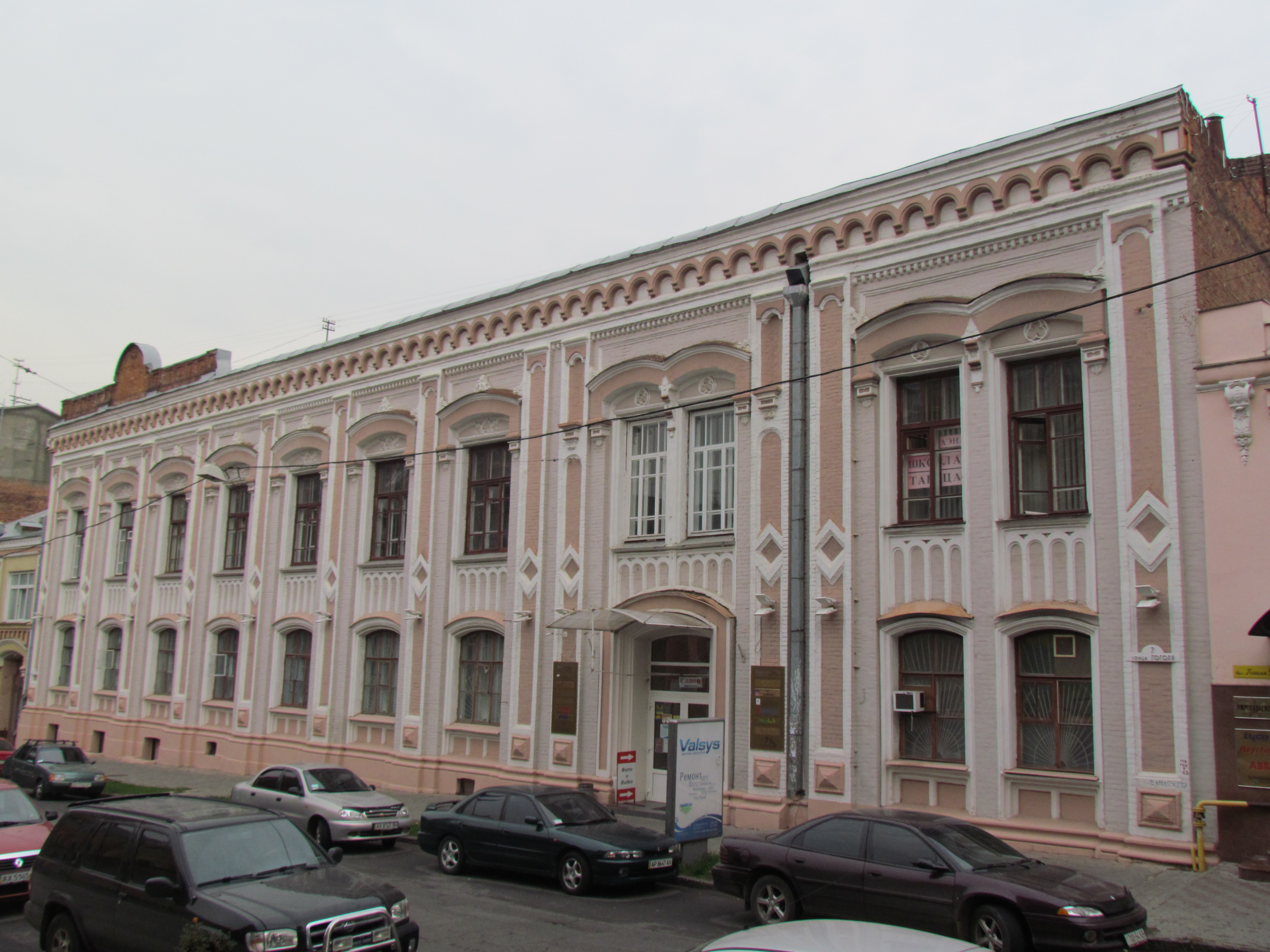 Україна, Харків, вул. Гоголя, 7